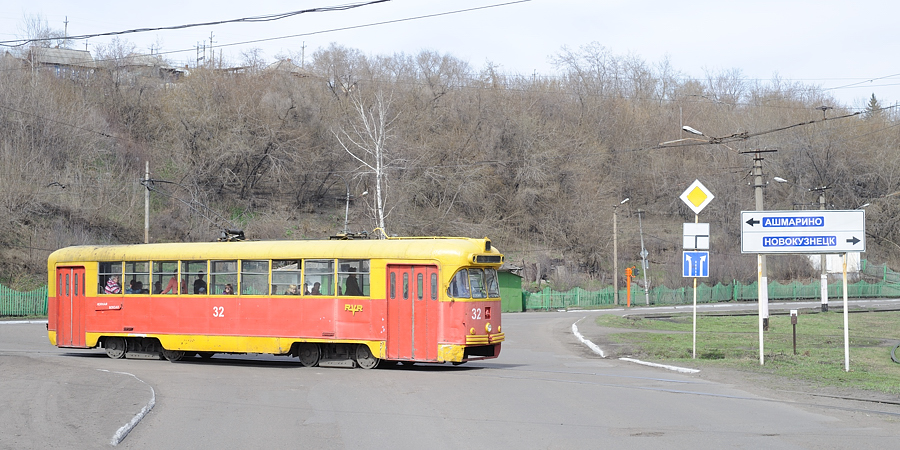 RVZ-6 32 in Ossinniki